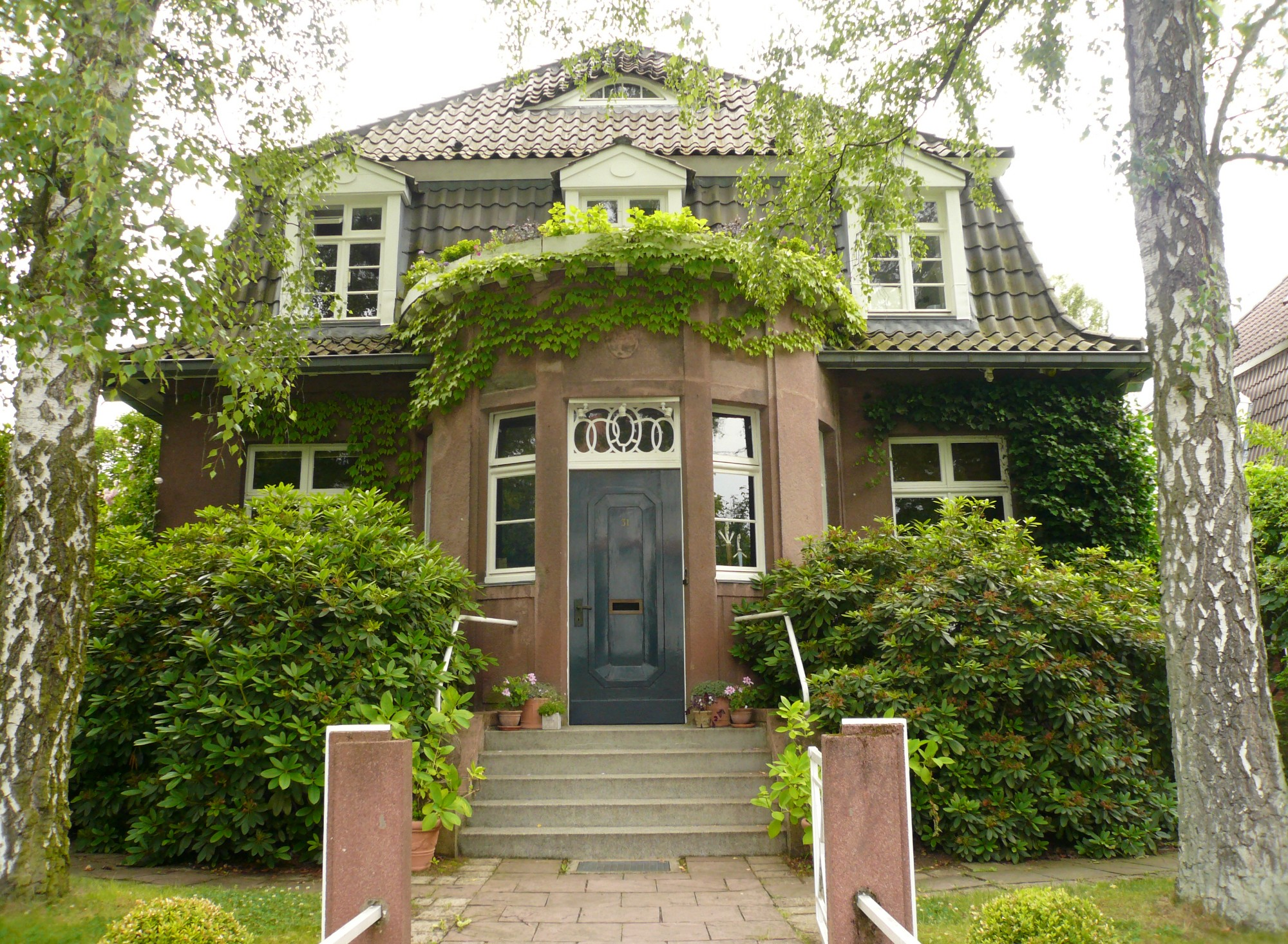 Villa Hermann Distel in Bergedorf